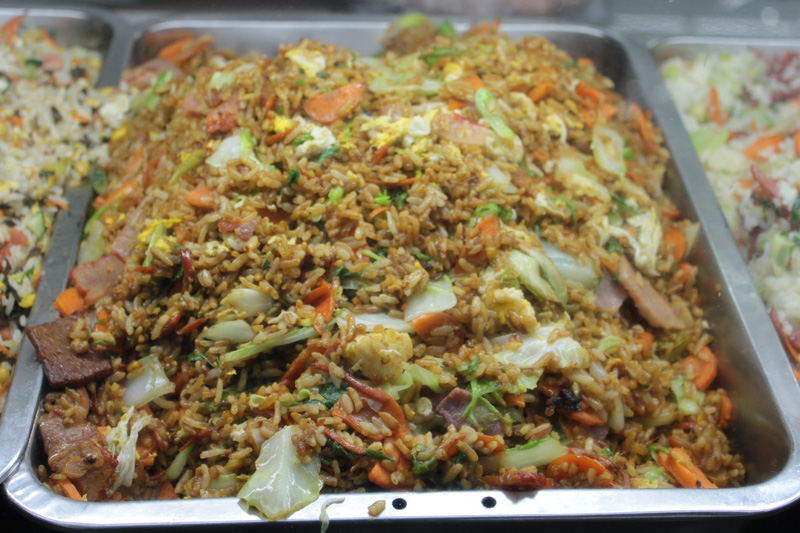 北京科技大学鸿博园餐厅一层供应的回锅肉老干妈炒饭